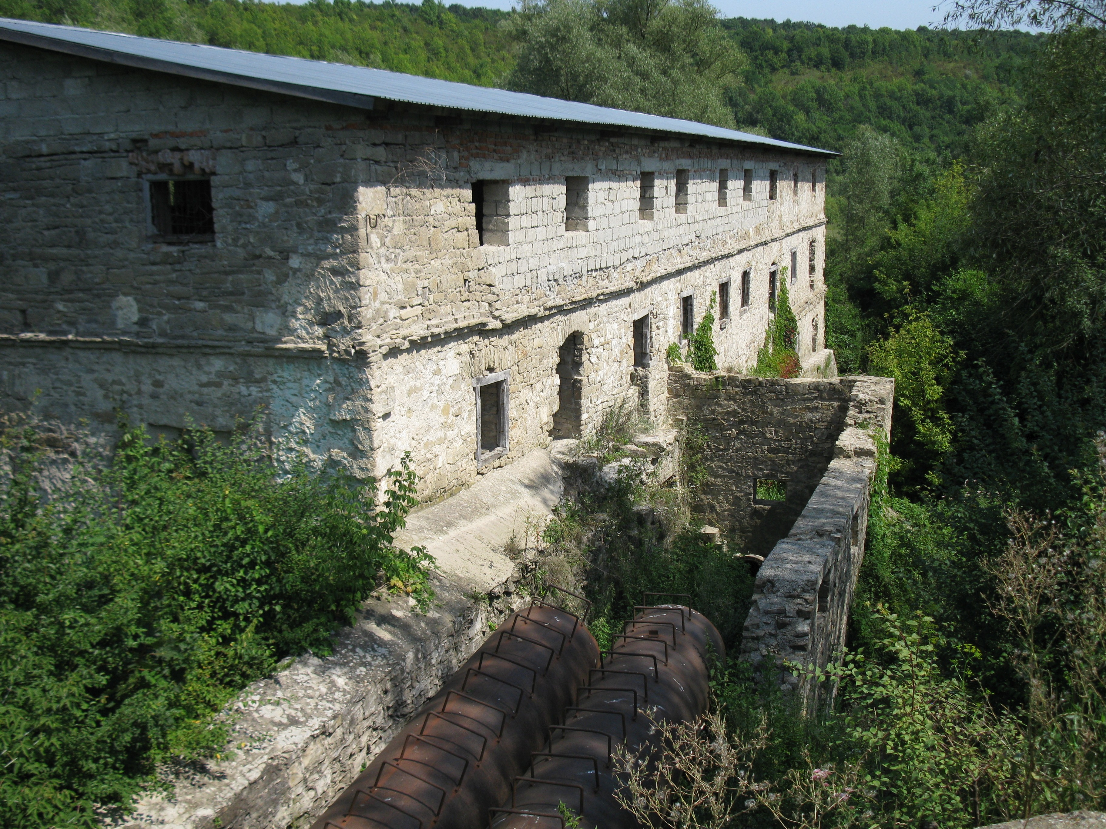 Водяний млин, село Рихта